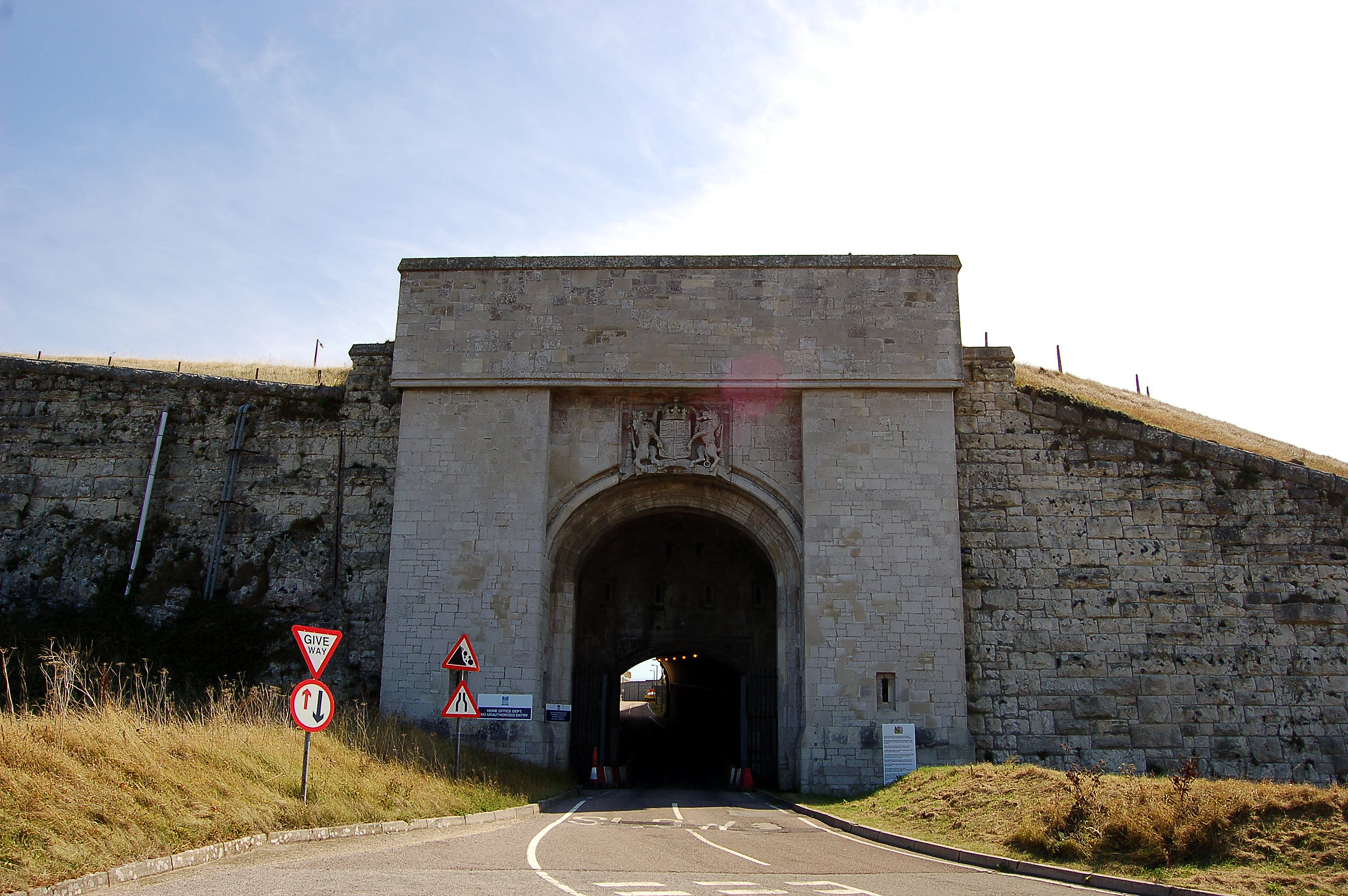 Verne (HM Prison)